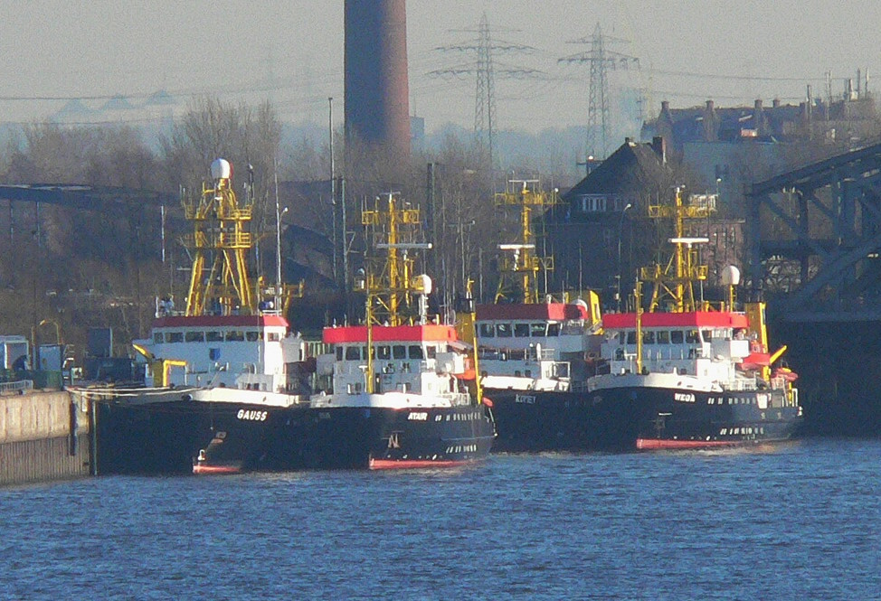 Deutsche Forschungsschiffe Gauss, Atair, Komet und Wega in der Weihnachtspause 2004 am Kirchenpauerkai in Hamburg 29.12.2004 Atair: IMO Number: 8521426 Komet: IMO Number: 9162978 Gauss: IMO Number: 7824883 Wega : IMO Number: 8901054